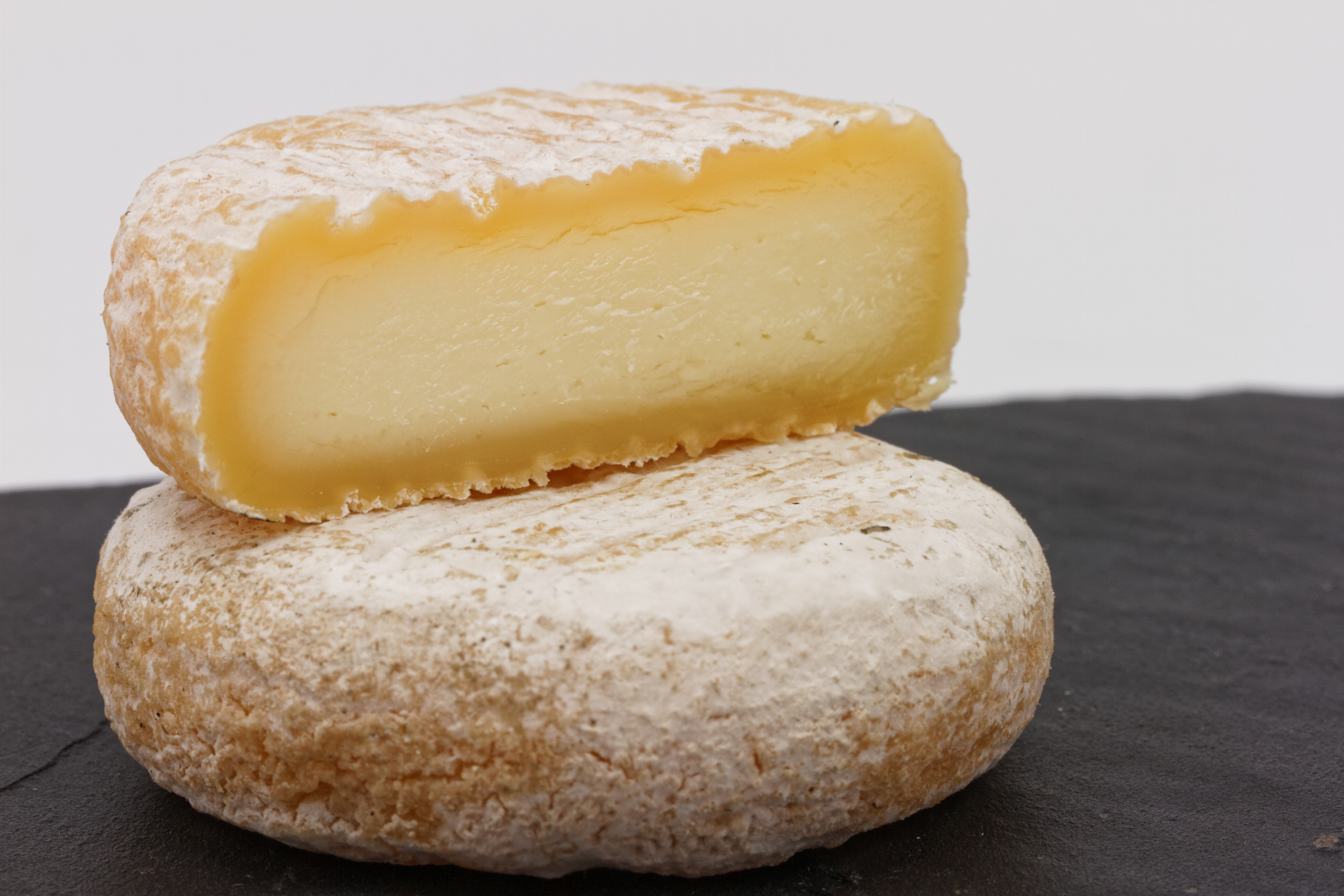 Le Picodon, fromage de la Drôme, l'Ardèche, le Vaucluse et le Gard.